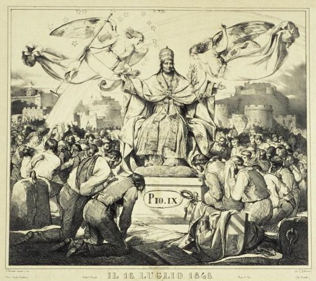 Allegoria del 16 luglio 1846 con Pio IX in trionfo, ridotto, ritoccato, litografia